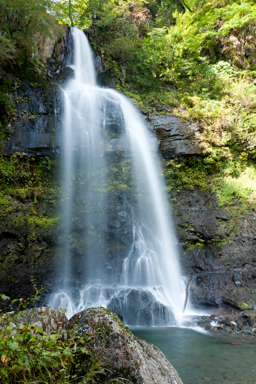 銚子ヶ滝